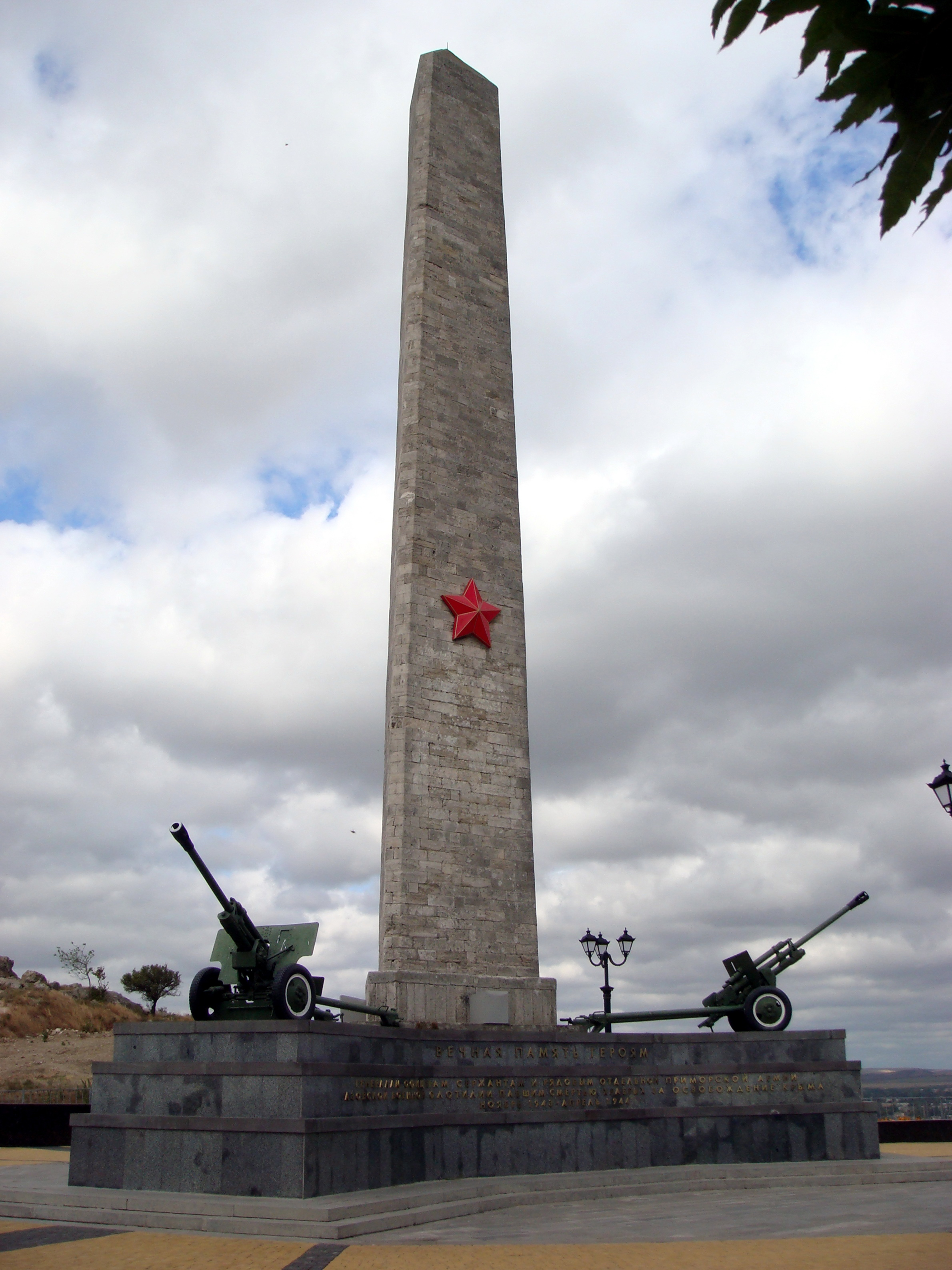 Керчь. Обелиск Славы на вершине горы Митридат.